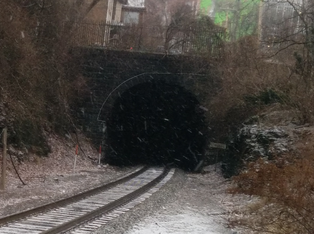 IMG_20160117_162025